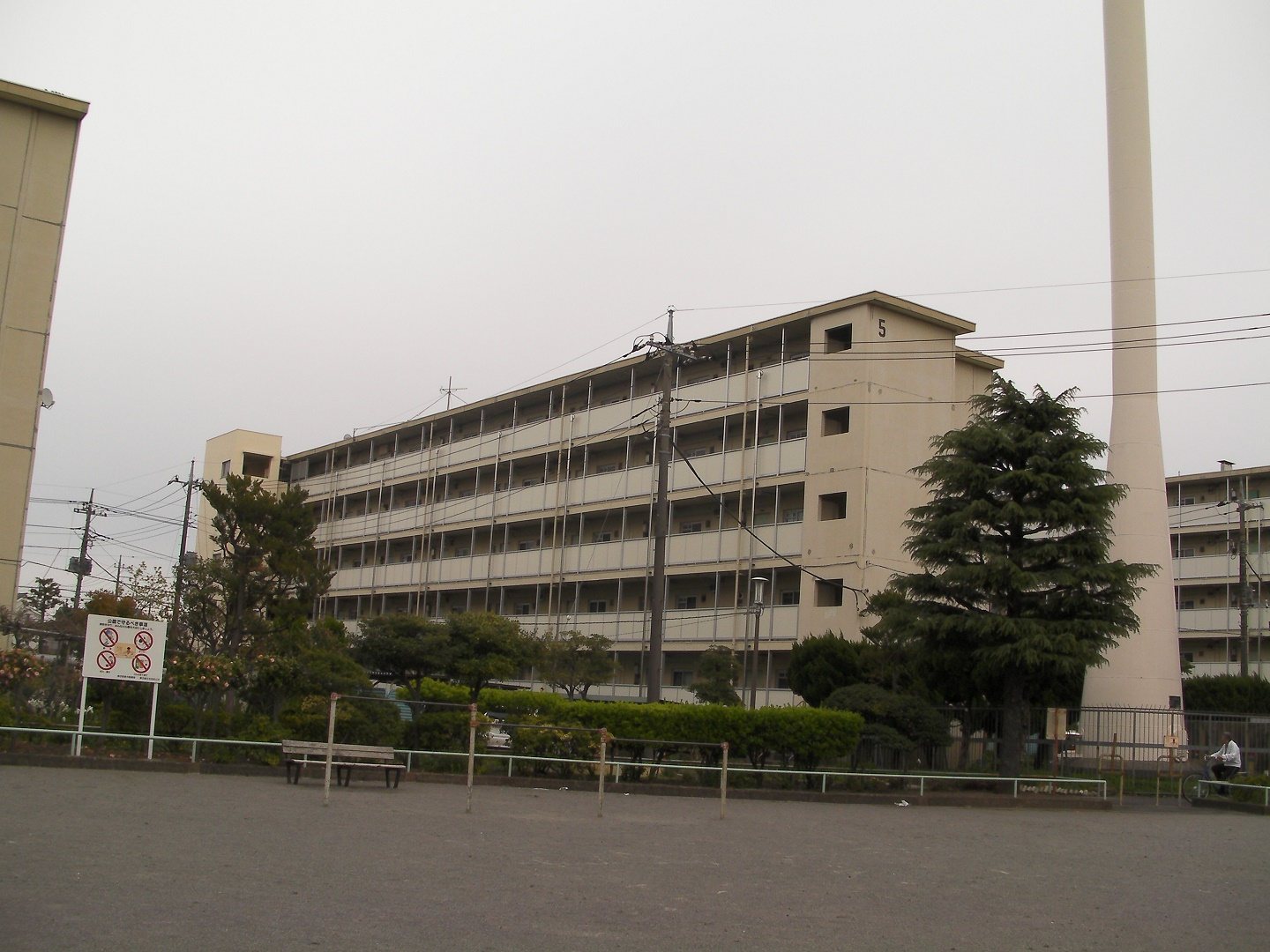 2019年4月、北綾瀬駅近くの都営辰沼アパートの片廊下タイプを中心部にある広場から撮影したものです。